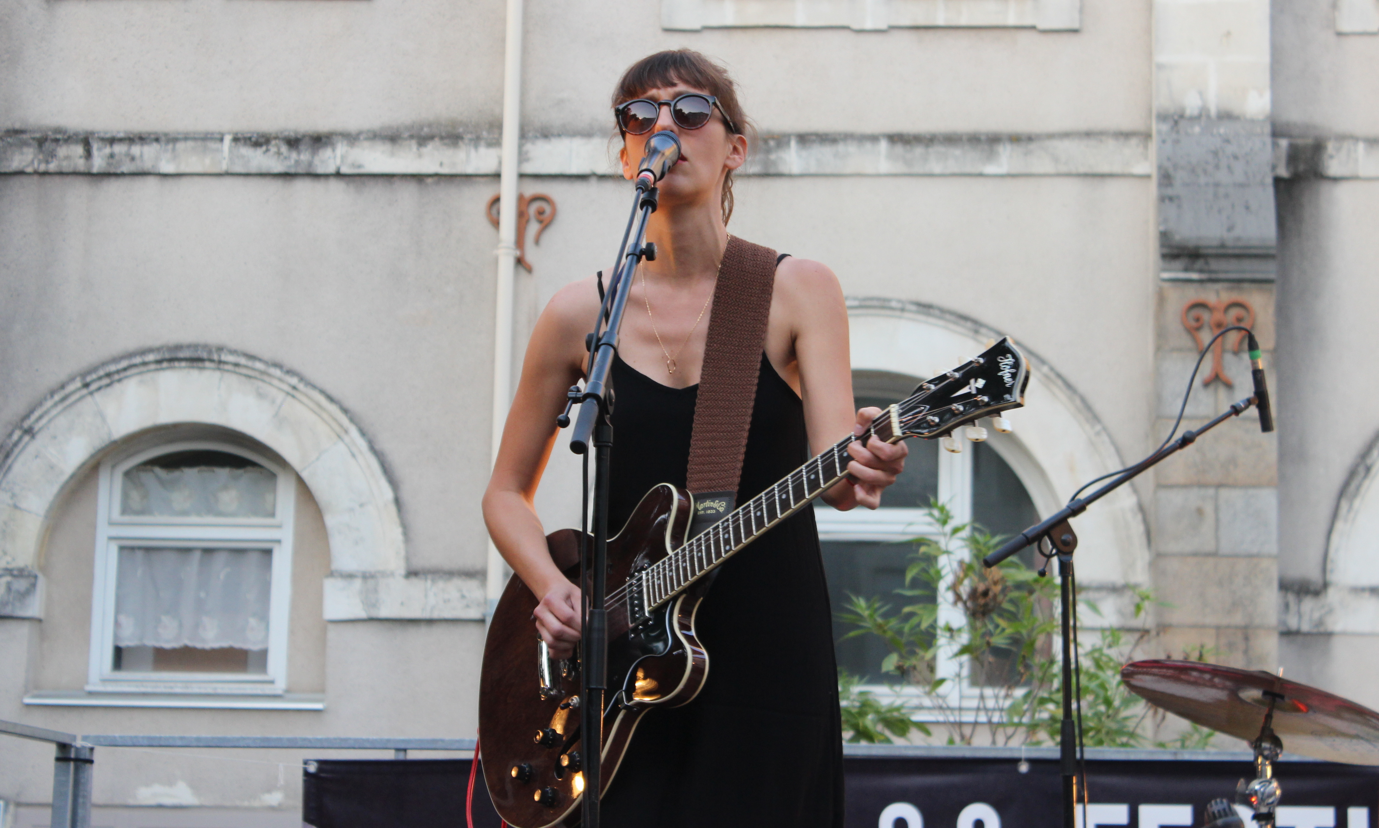 Ceci Kelly, au chant et à la guitare électrique du trio argentin Las Kellies lors de la soirée de clôture du festival Fumetti à Nantes, le 8 juillet 2017.